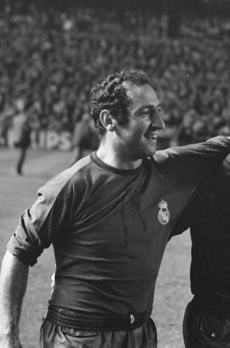 Paco Gento (cropped)